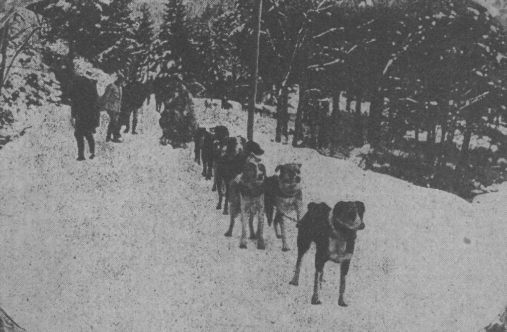 Un attelage des SECA (Sections d'équipages canins d'Alaska) dans les Vosges (France) en liaison avec le Général Nollet.